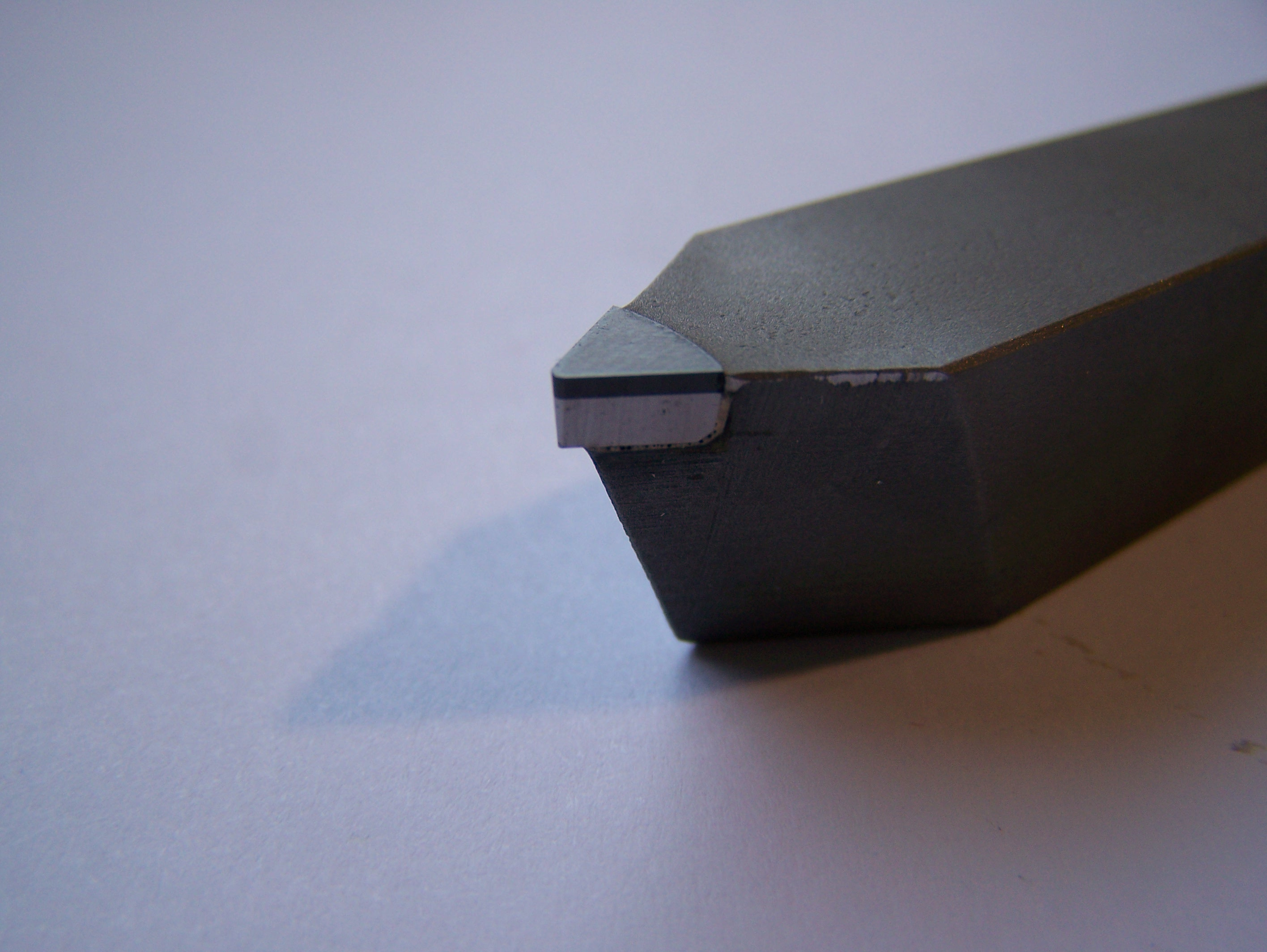 PolyKristalinerDiamant